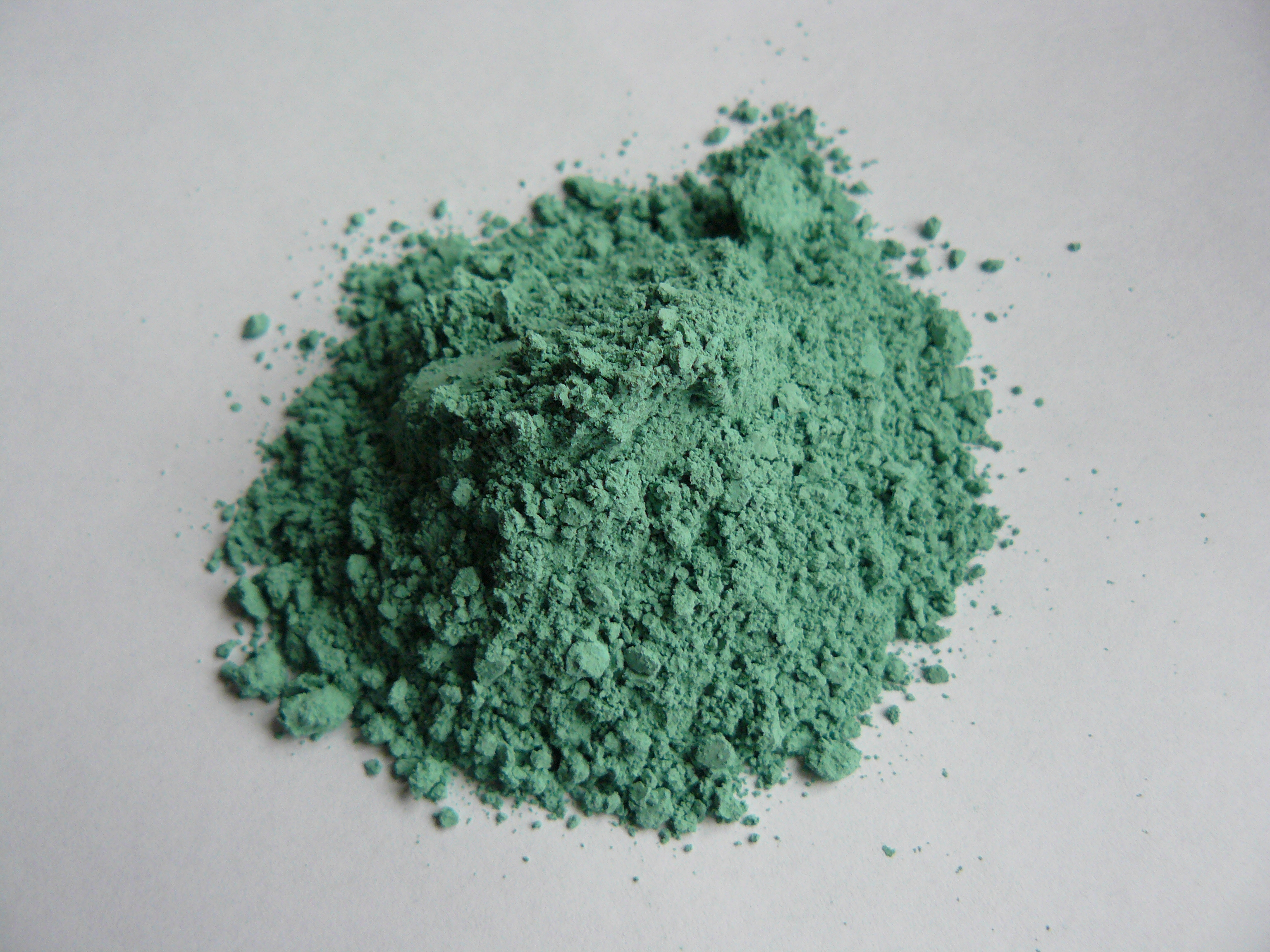 Copper (II) Hydroxide in powder